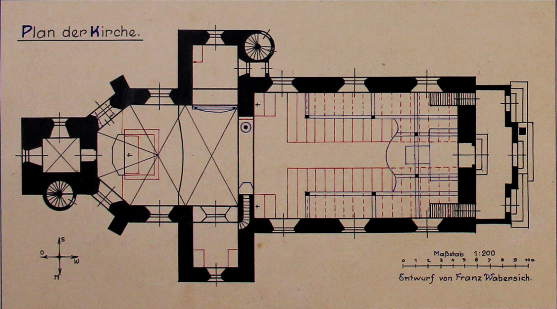 Půdorys kostela svatých Šimona a Judy v Lipové.